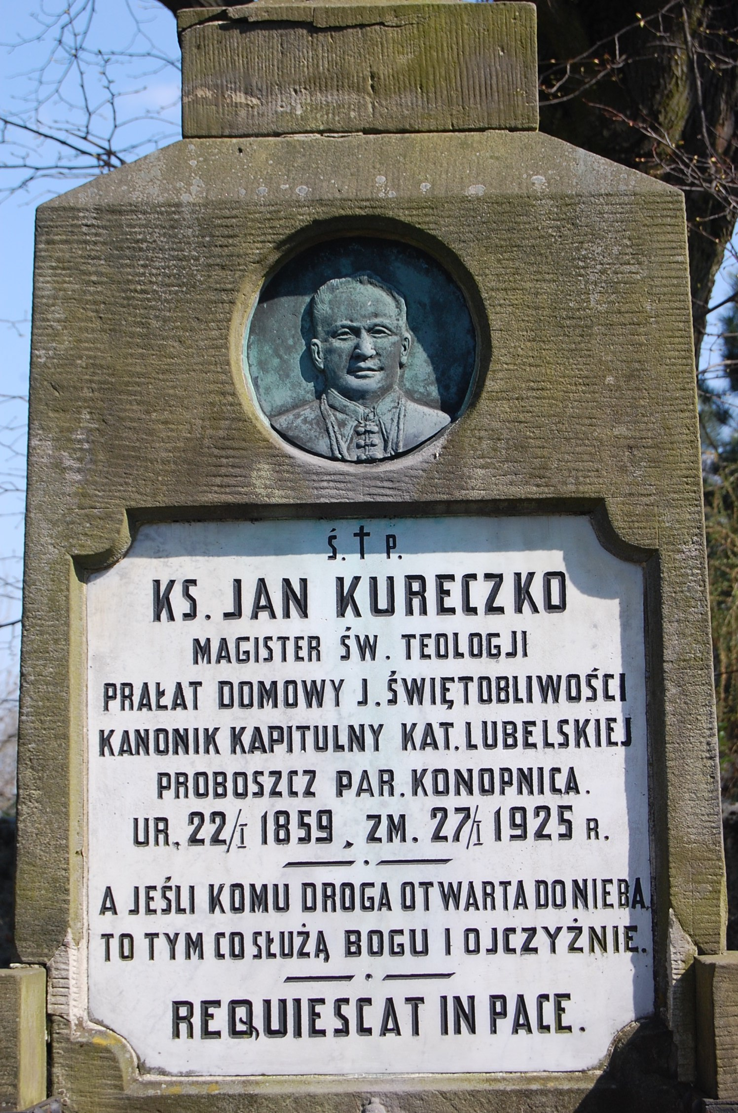 Tablica nagrobna, grób ks. Jana Kureczki